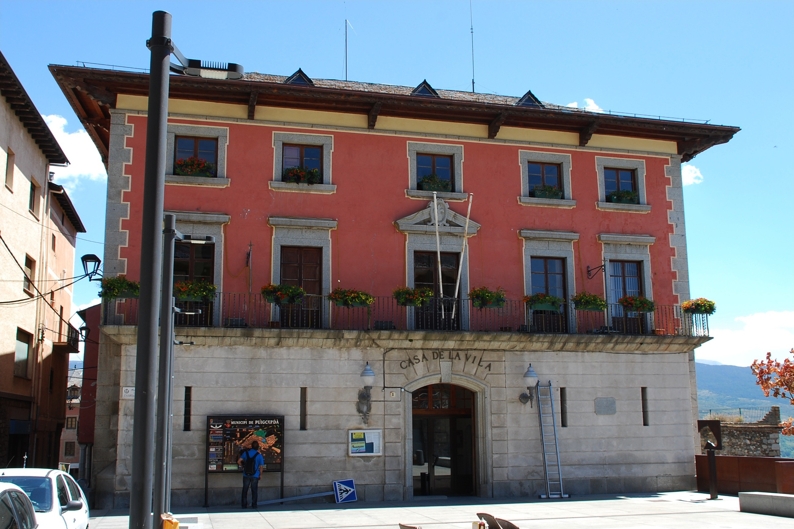 Ayuntamiento de Puigcerdá en la provincia de Gerona (Cataluña, España).